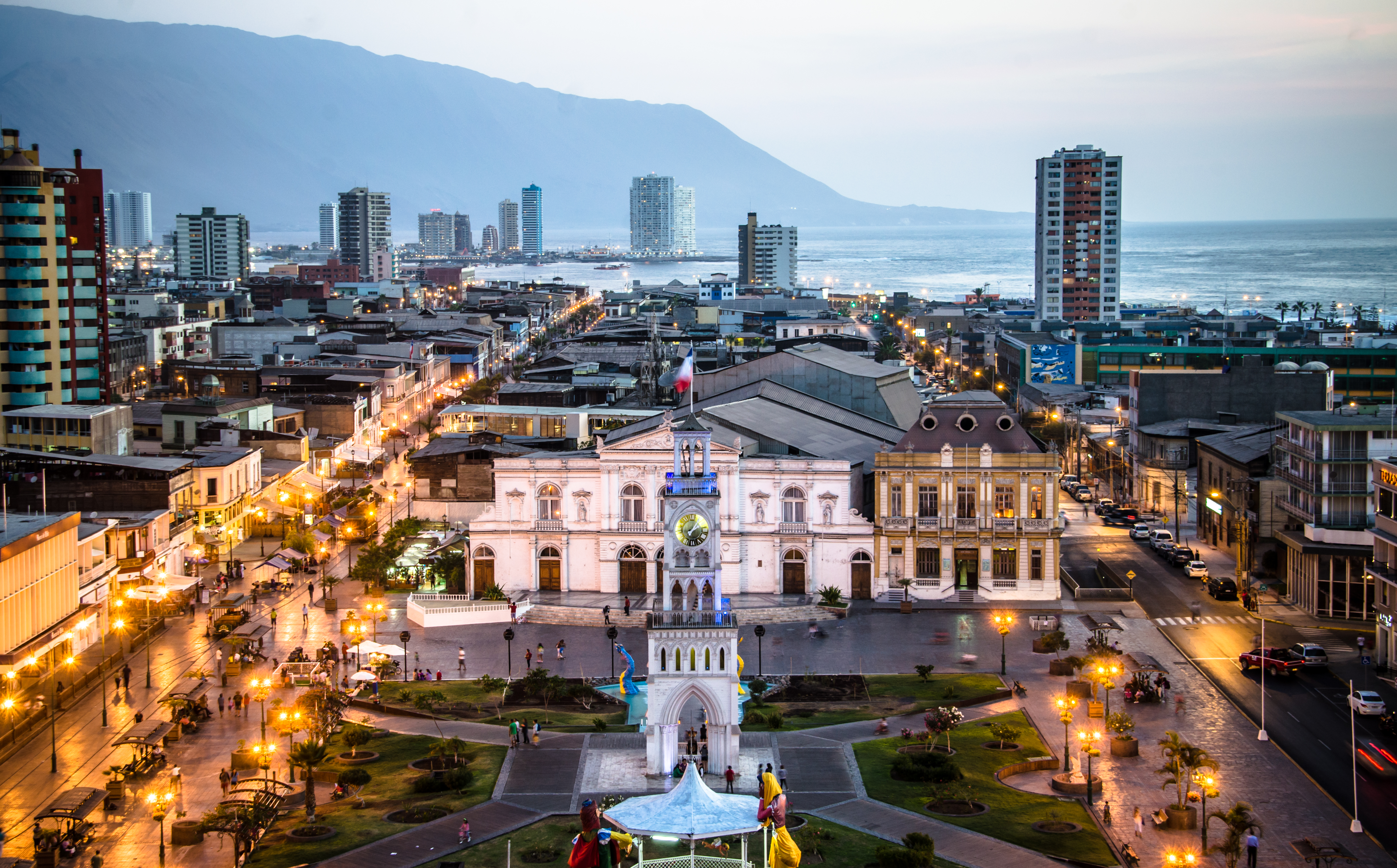 Calle Baquedano y Plaza Arturo Prat This is a photo of a national monument in Chile: 527